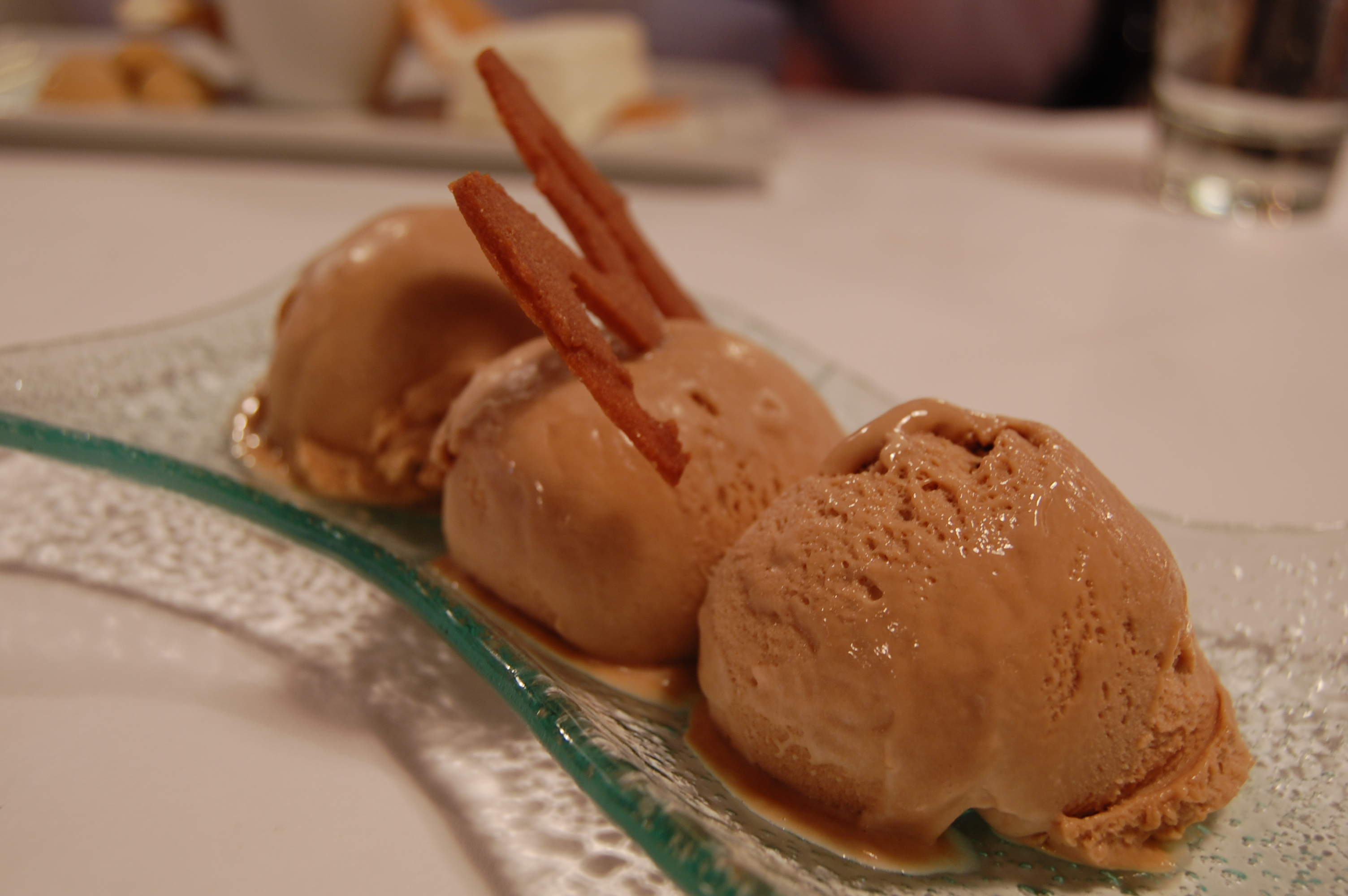 Chocolate malt ice cream